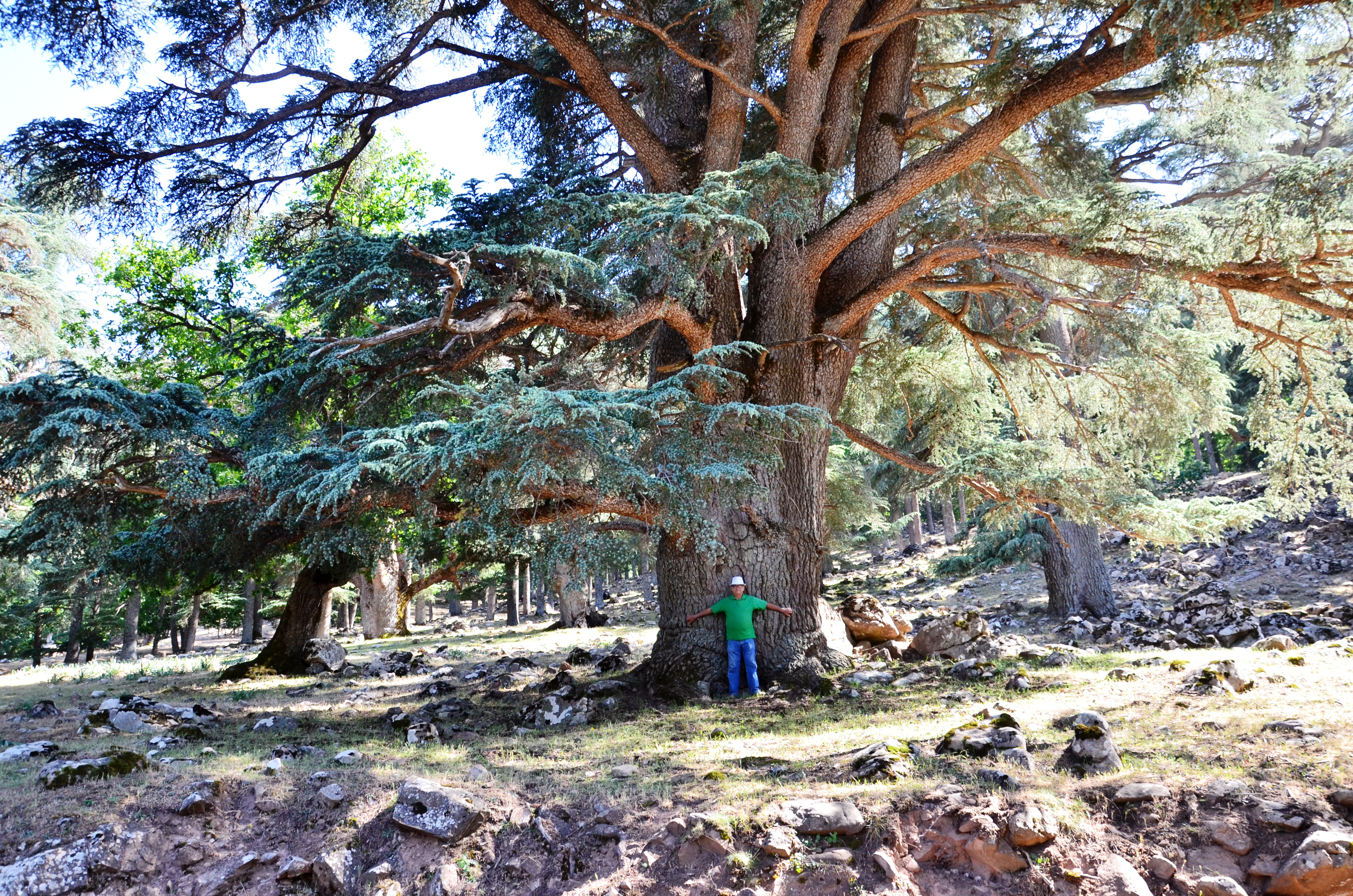 La forêt des cèdres de Theniet El Had s’étend sur 3424 ha dont 1000 ha de cèdre